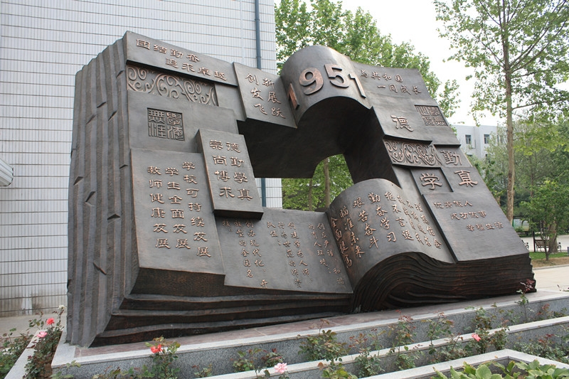 中文（中国大陆）: 三中校内雕塑